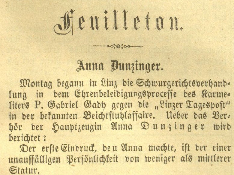 Die Beichtstuhl-Affäre um Anna Dunzinger - Klagenfurter Zeitung 1872